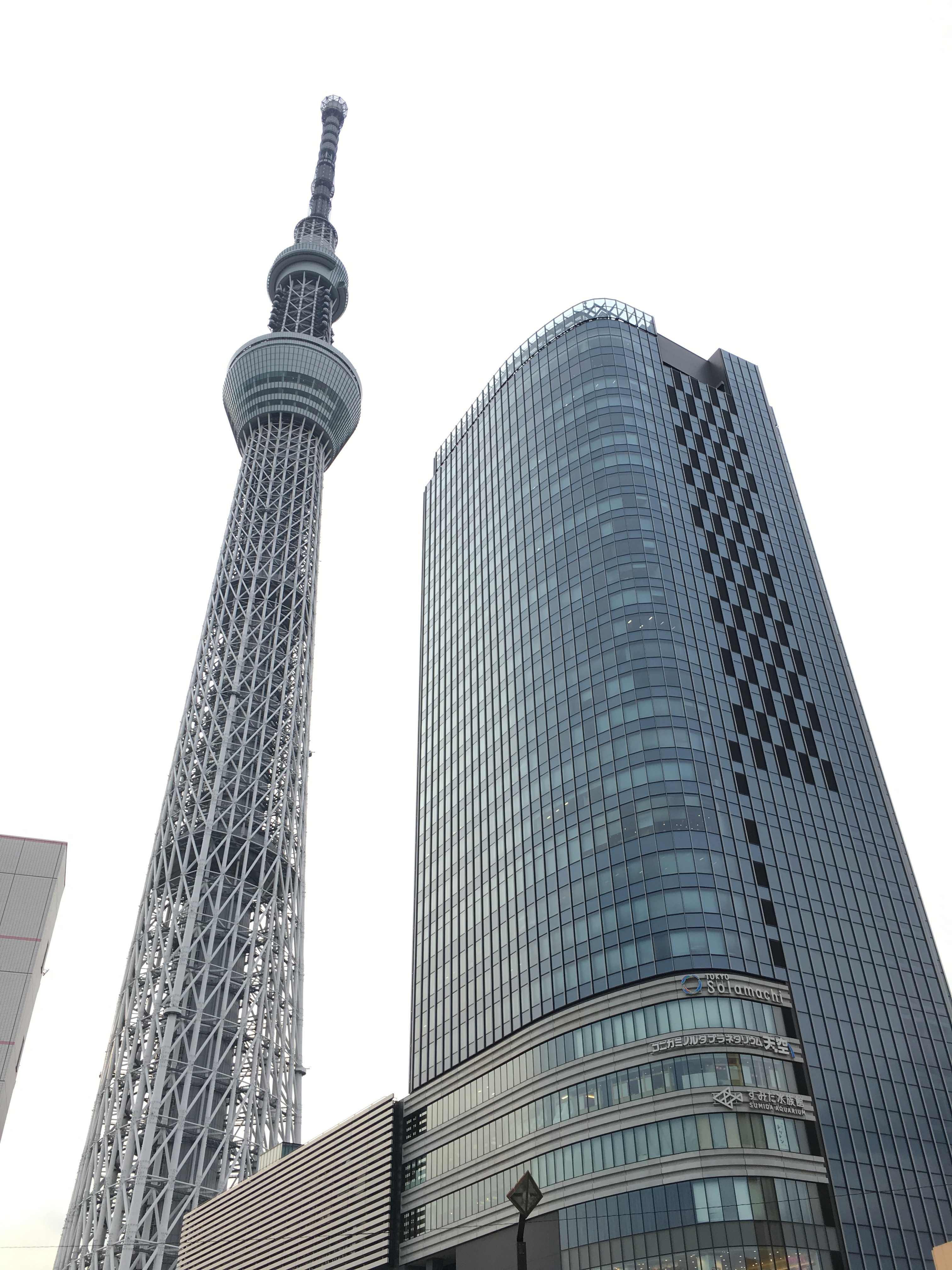 ソラマチビル＆スカイツリー